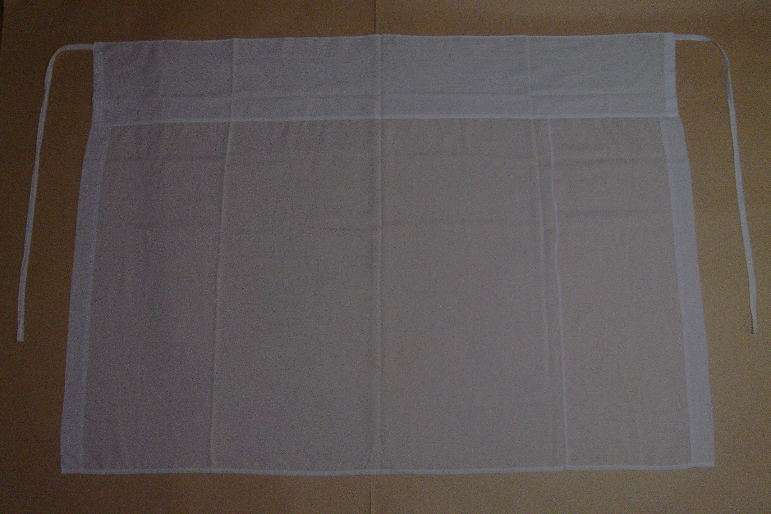 和装下着の「裾除け」です。